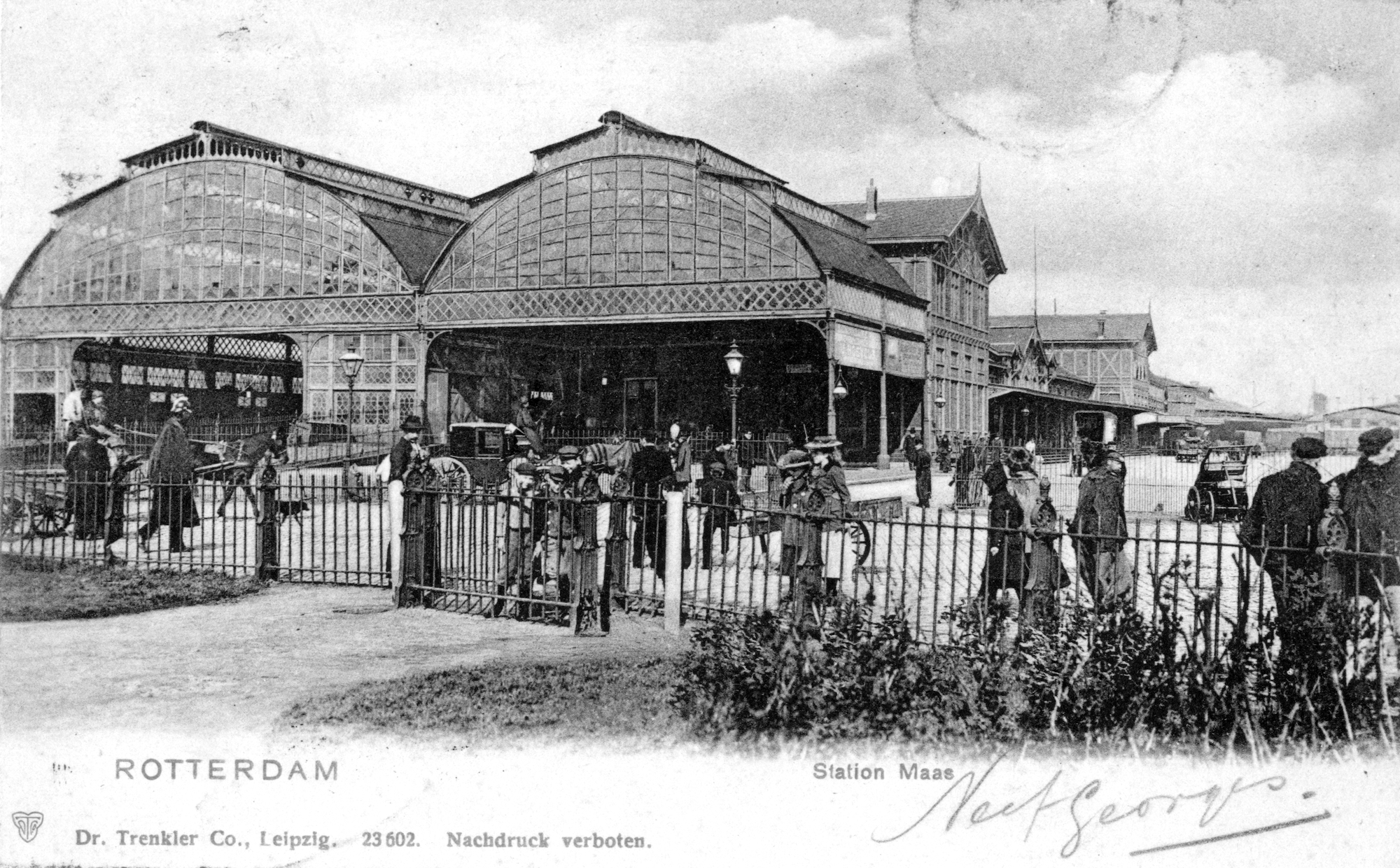 Station Rotterdam Maas te Rotterdam; circa 1900. Collectie van het Utrechts Archief.